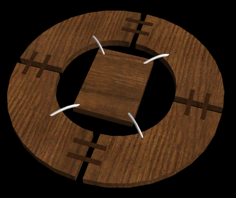 水蜘蛛。忍者の水上歩行器